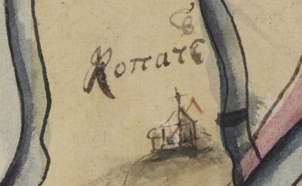 Фрагмент карти Київської губернії. XVIII століття. РГАДА, ф. 192, оп. 1, Киевская губ., № 5.